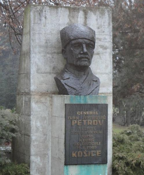 Памятник генералу армии Ивану Ефимовичу Петрову, освободившему Кошице от оккупационных войск вермахта. Кошице, 3 января 2012 года